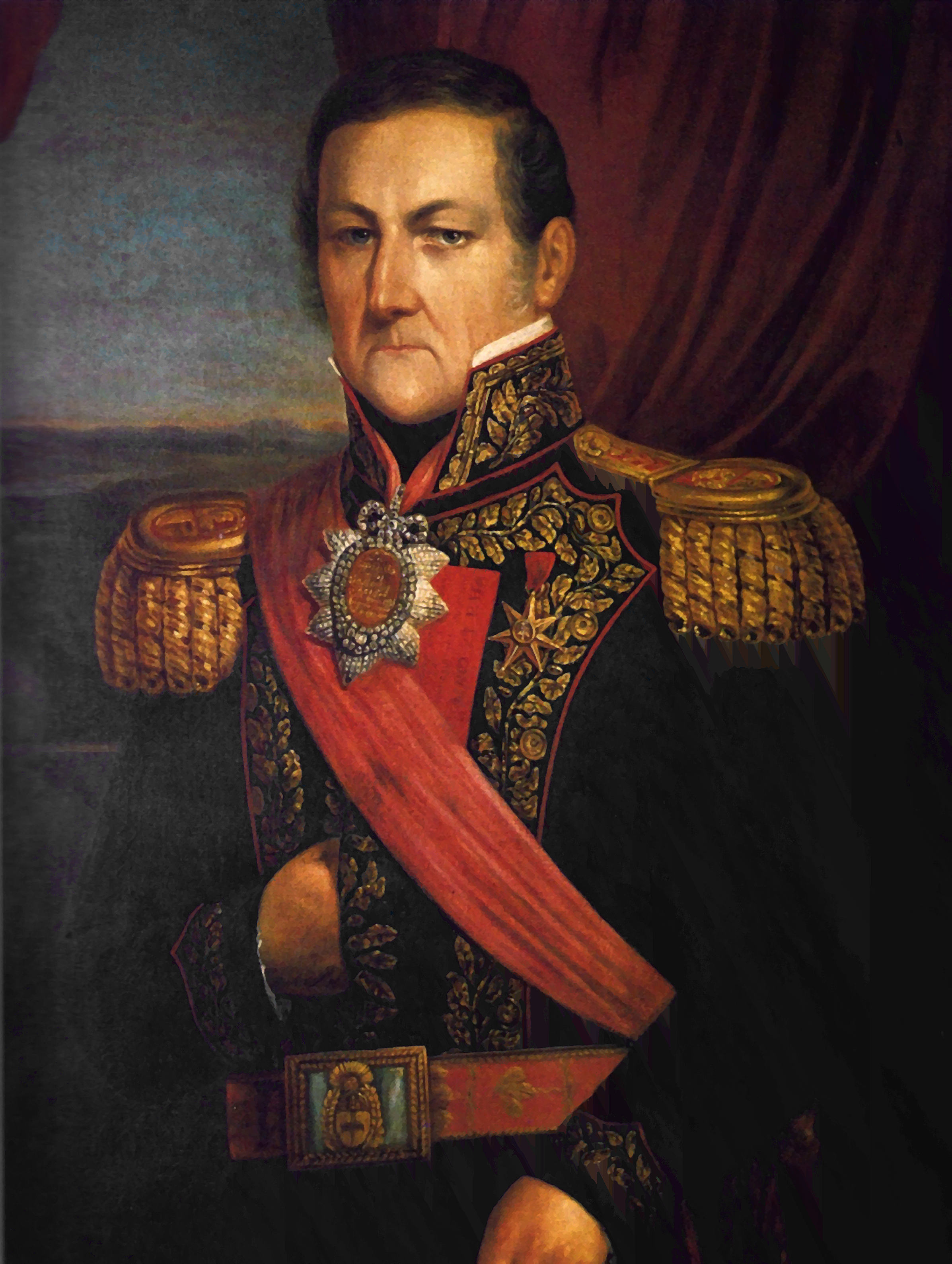 Juan Manuel de Rosas (1793-1877)